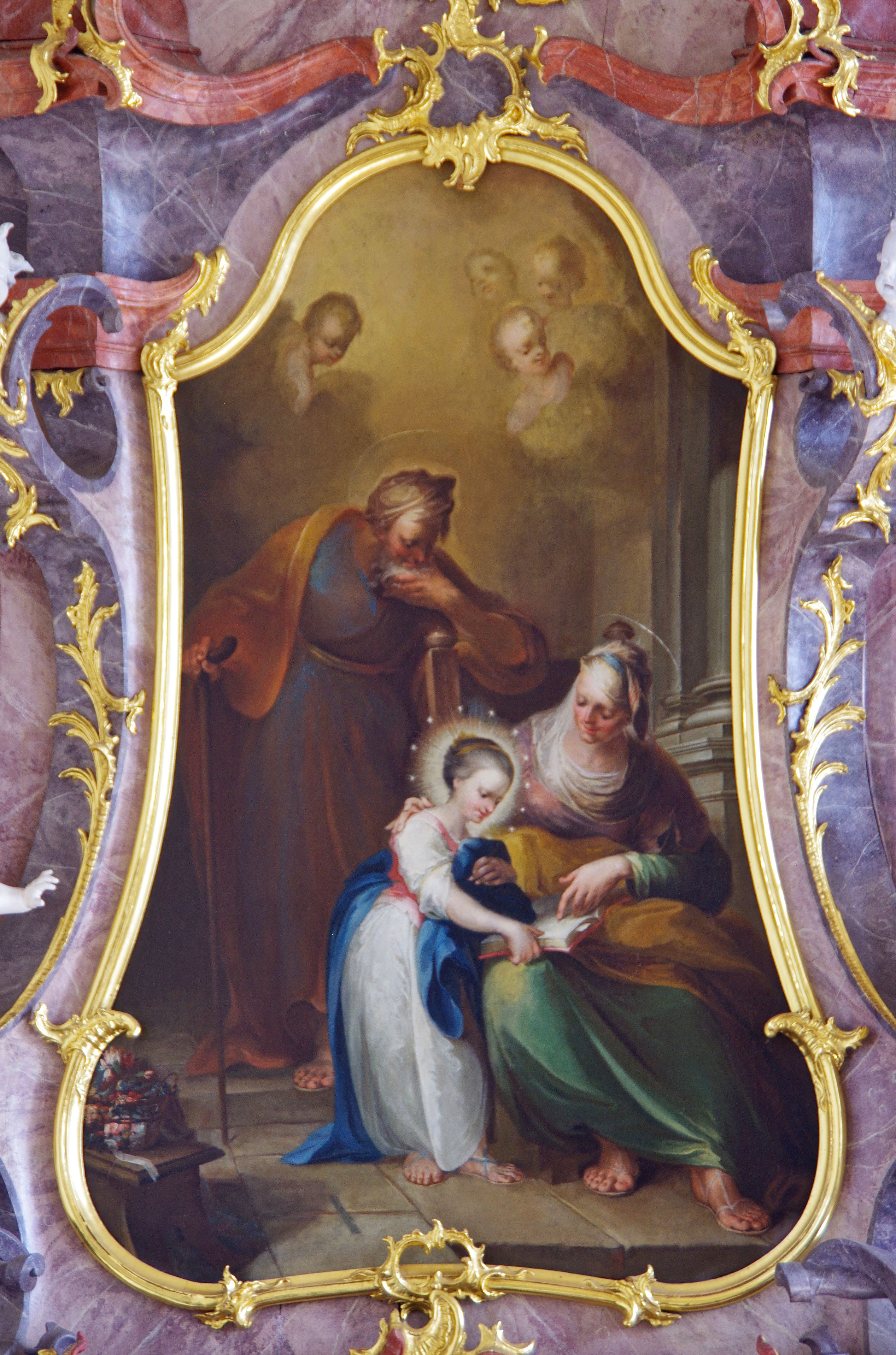 Die katholische Kirche St. Jakobus in Stegen-Eschbach